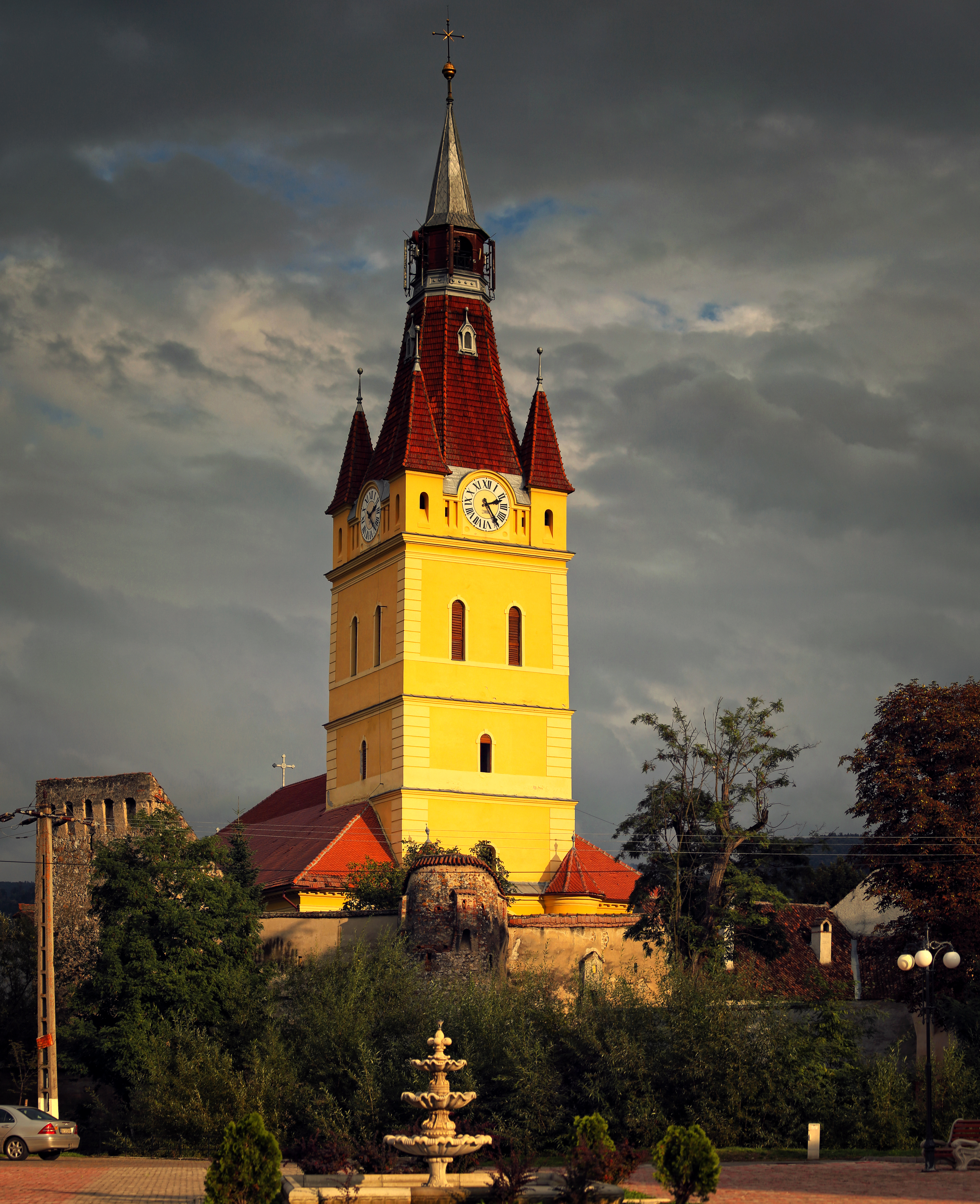 Biserica evanghelică din Cristian, jus. Brașov 01